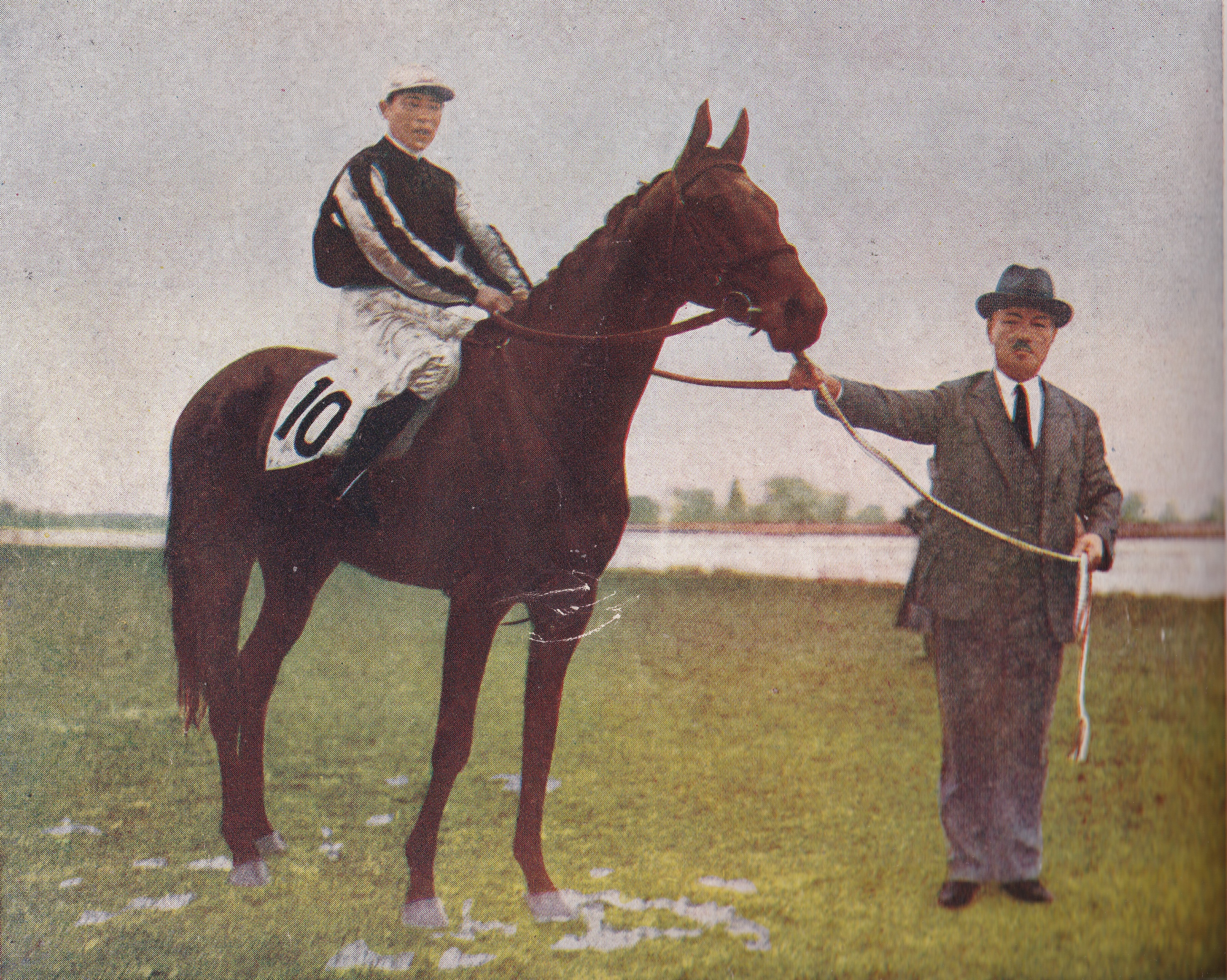 ガヴアナーの彩色写真